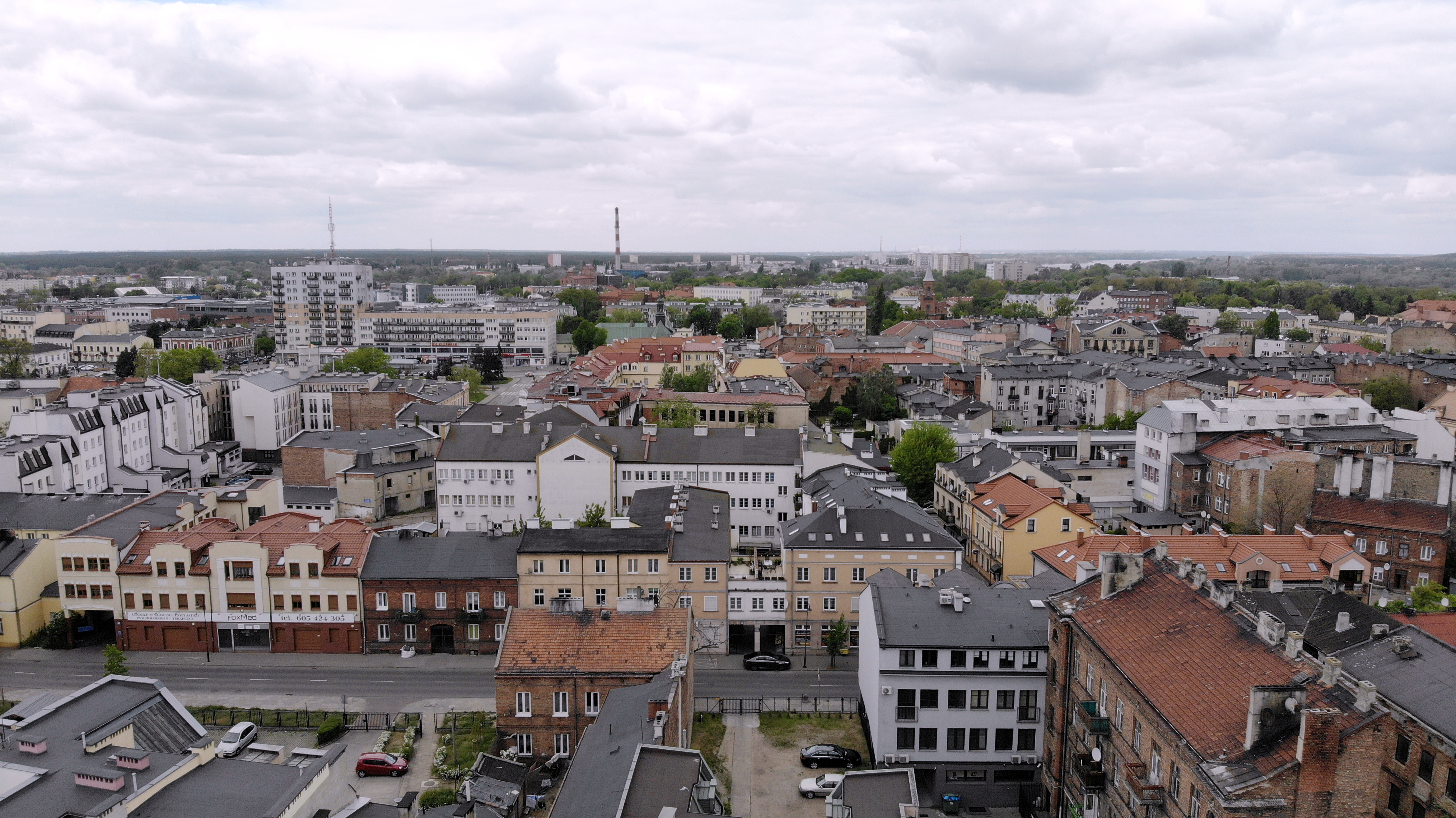 Śródmieście (2020 r.)